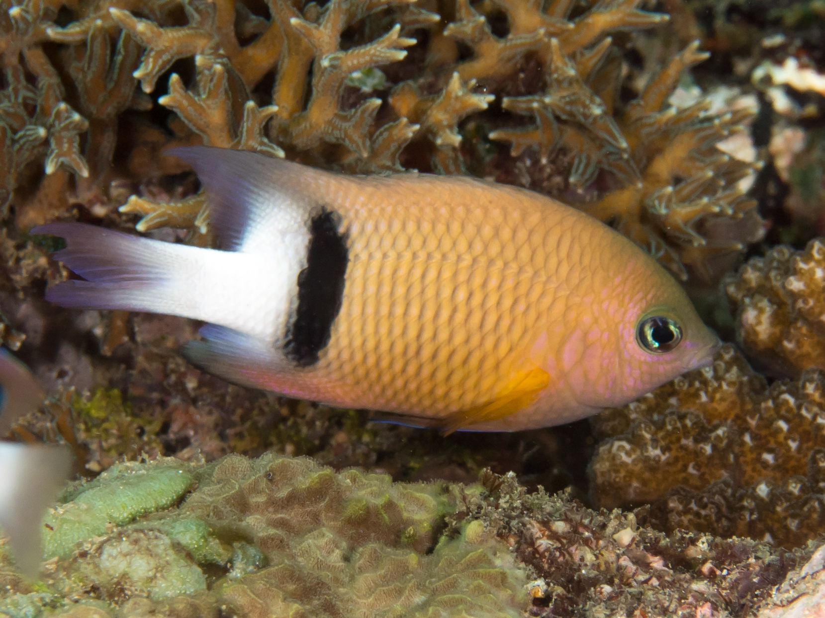 Morotai, Indonesia - Blackbar damsel (Plectroglyphidodon dickii)